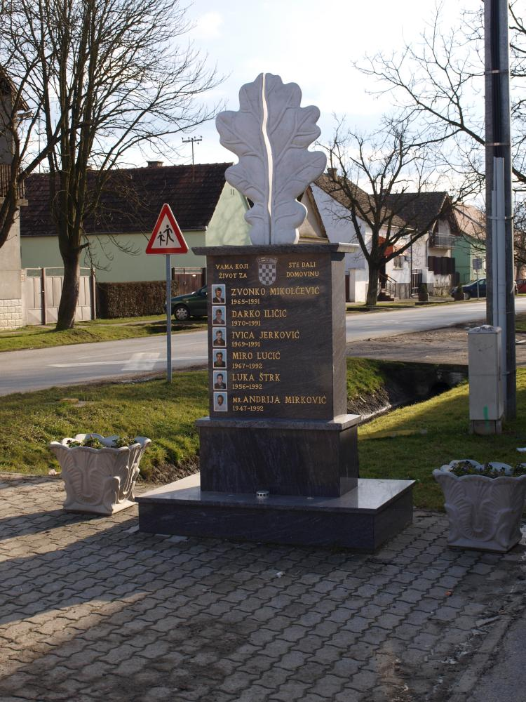 Spomenik poginulim braniteljima u selu Ruščica.